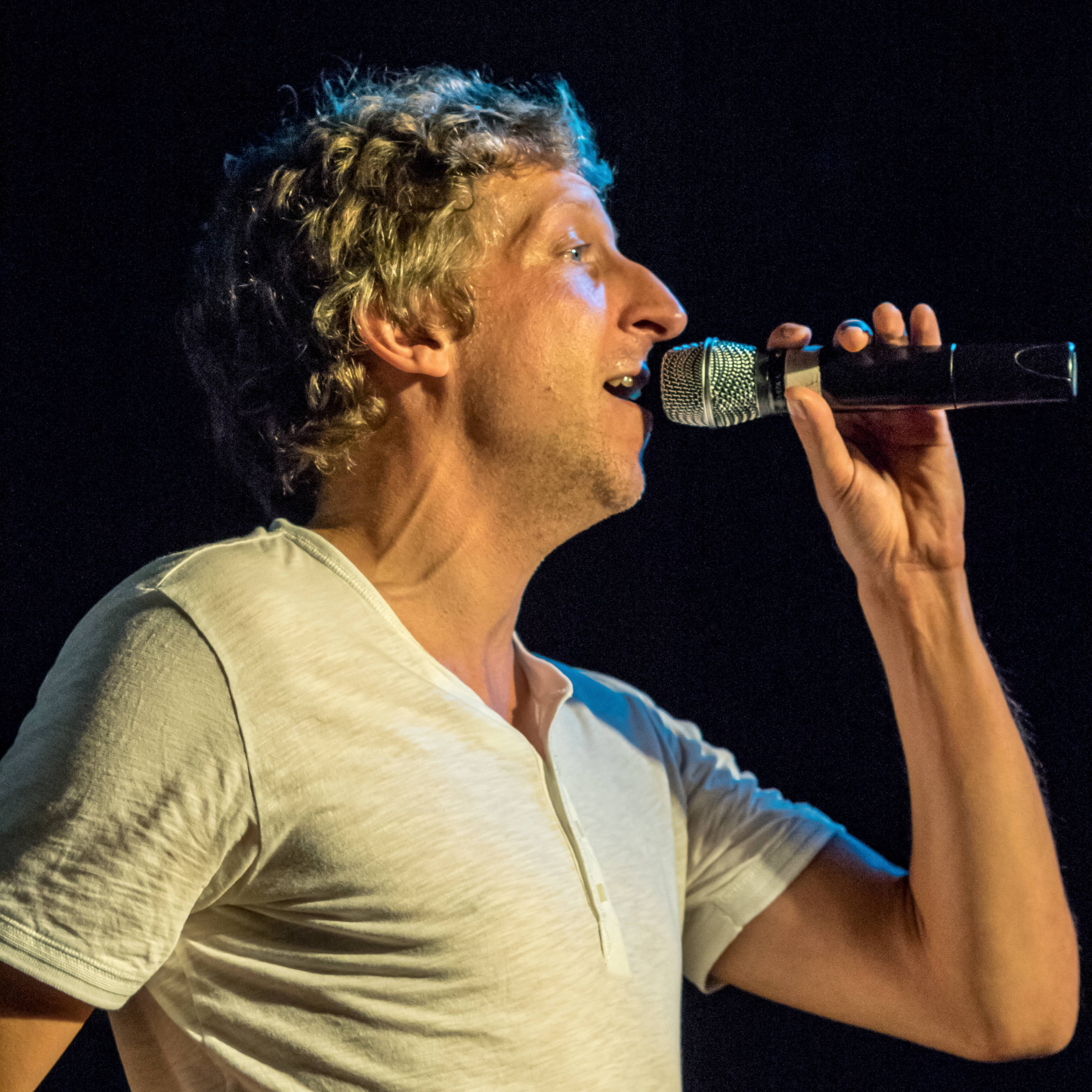 Bilder vom Konzert in Freiburg i. Br. Die A capella Gruppe Basta am 01. März 2015 William Wahl